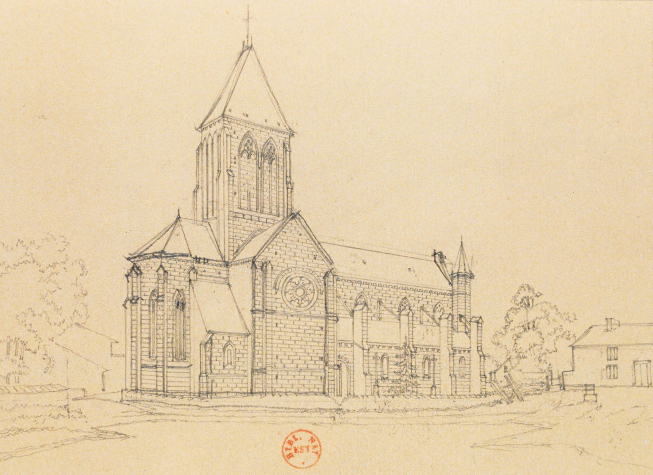 Blécourt. Vue de l'Église prise sur le transept nord. Haute Marne : [dessin] / [Hubert Clerget]